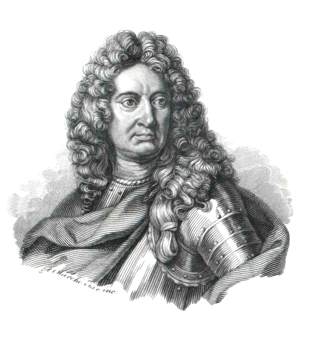 Marsigli, Luigi Fernando Conte di (1658 - 1730)